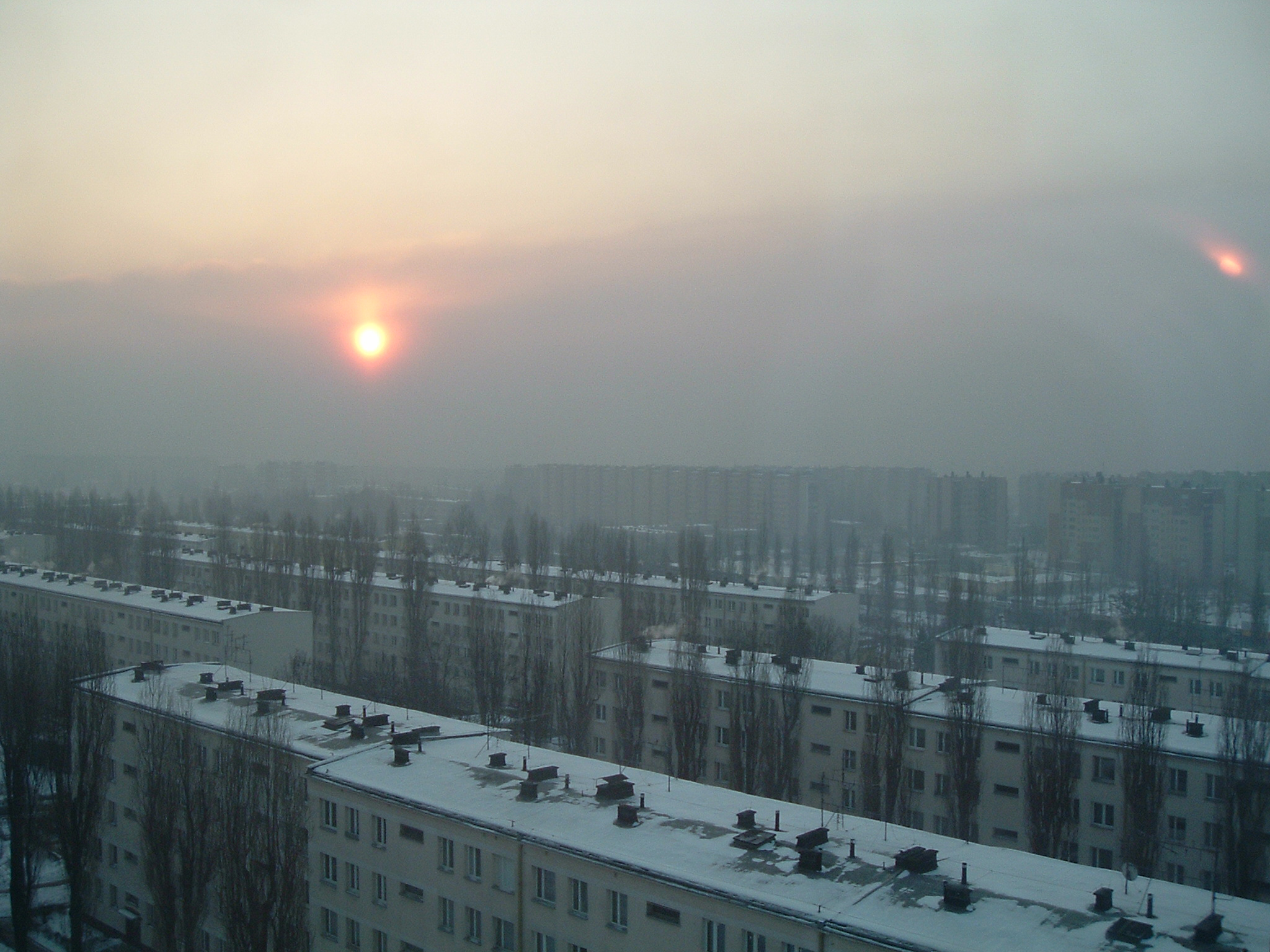 Nowa Huta